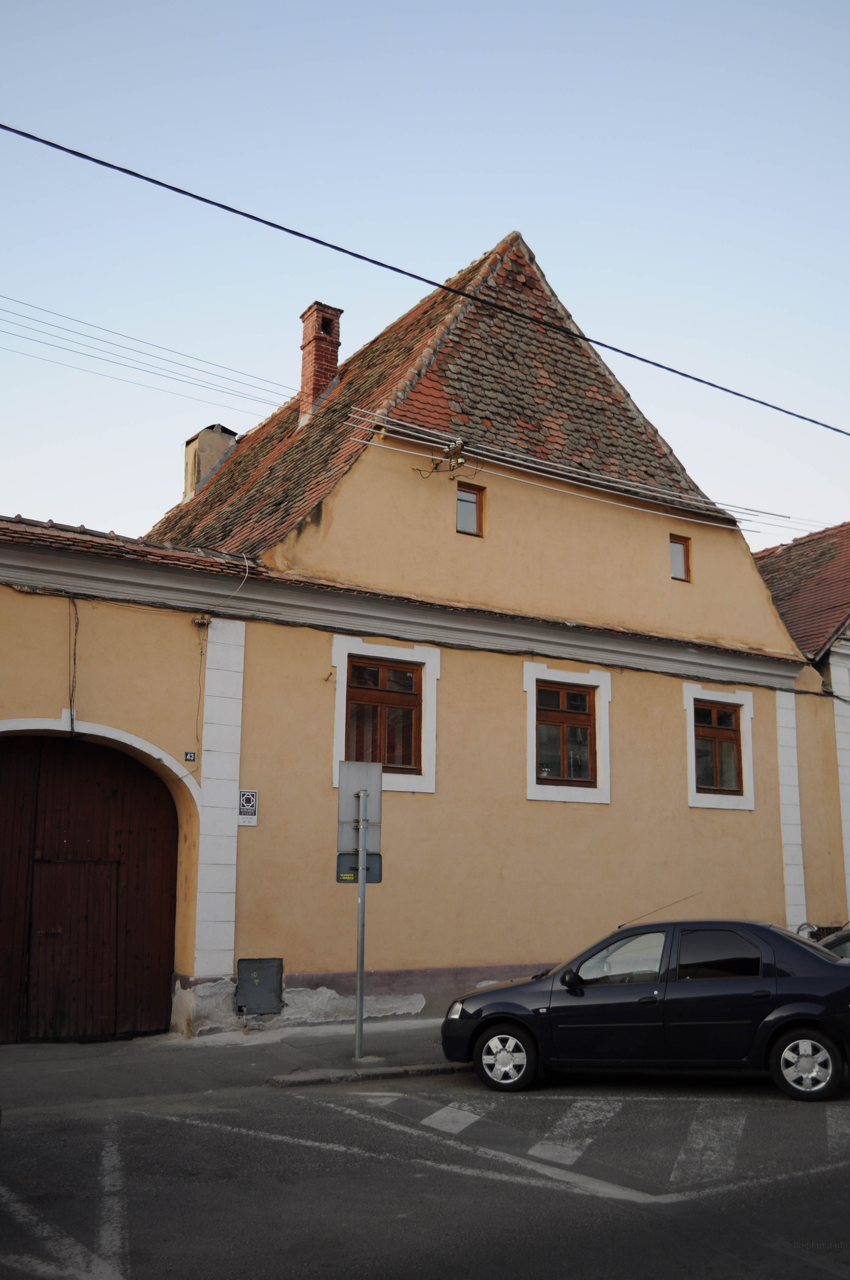 Str. 9 Mai 43